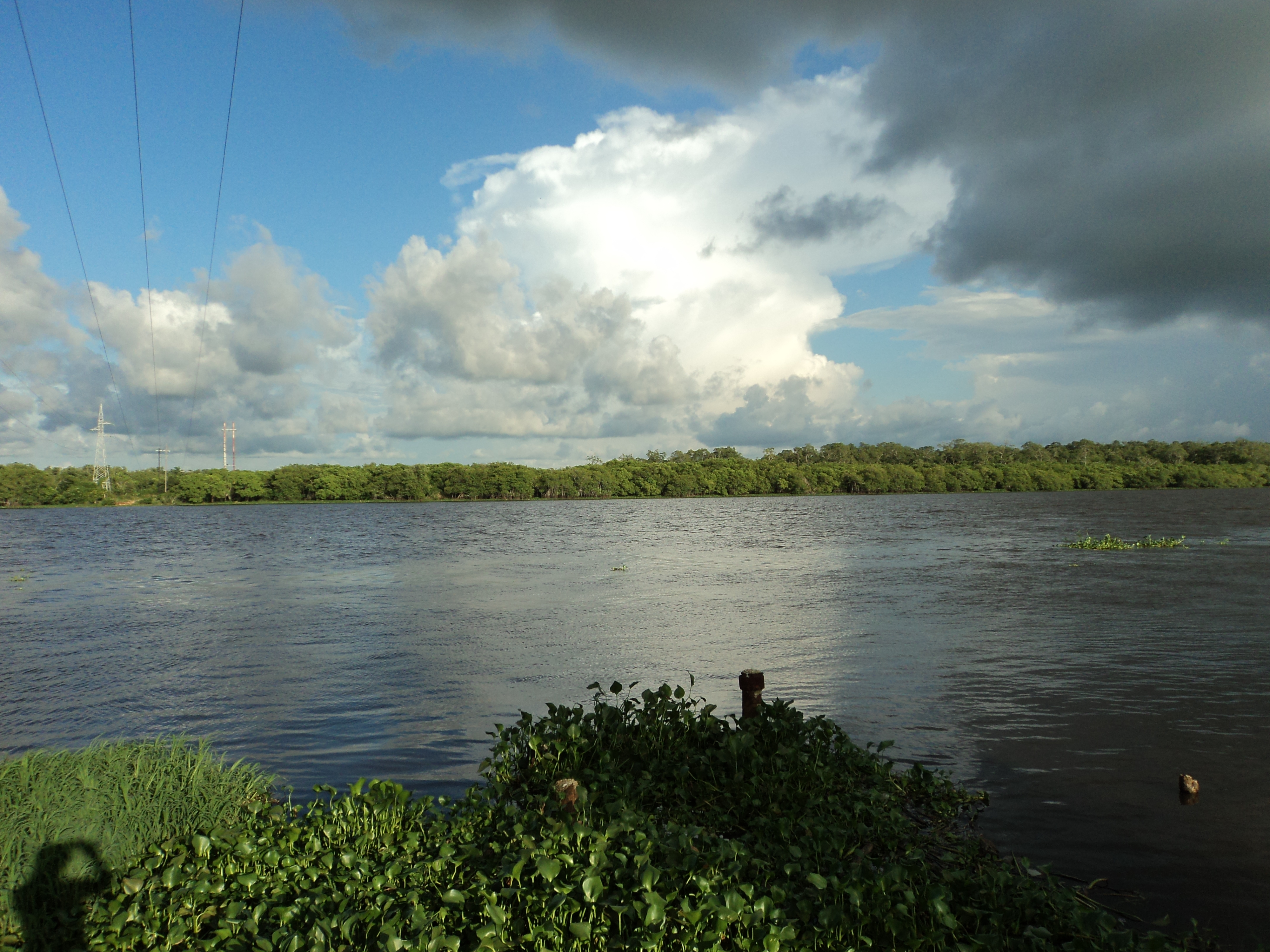 Foto tomada en el municipio de Agua Dulce Veracruz, desde la Panga vieja. Al fondo se encuentra el estado de Tabasco.